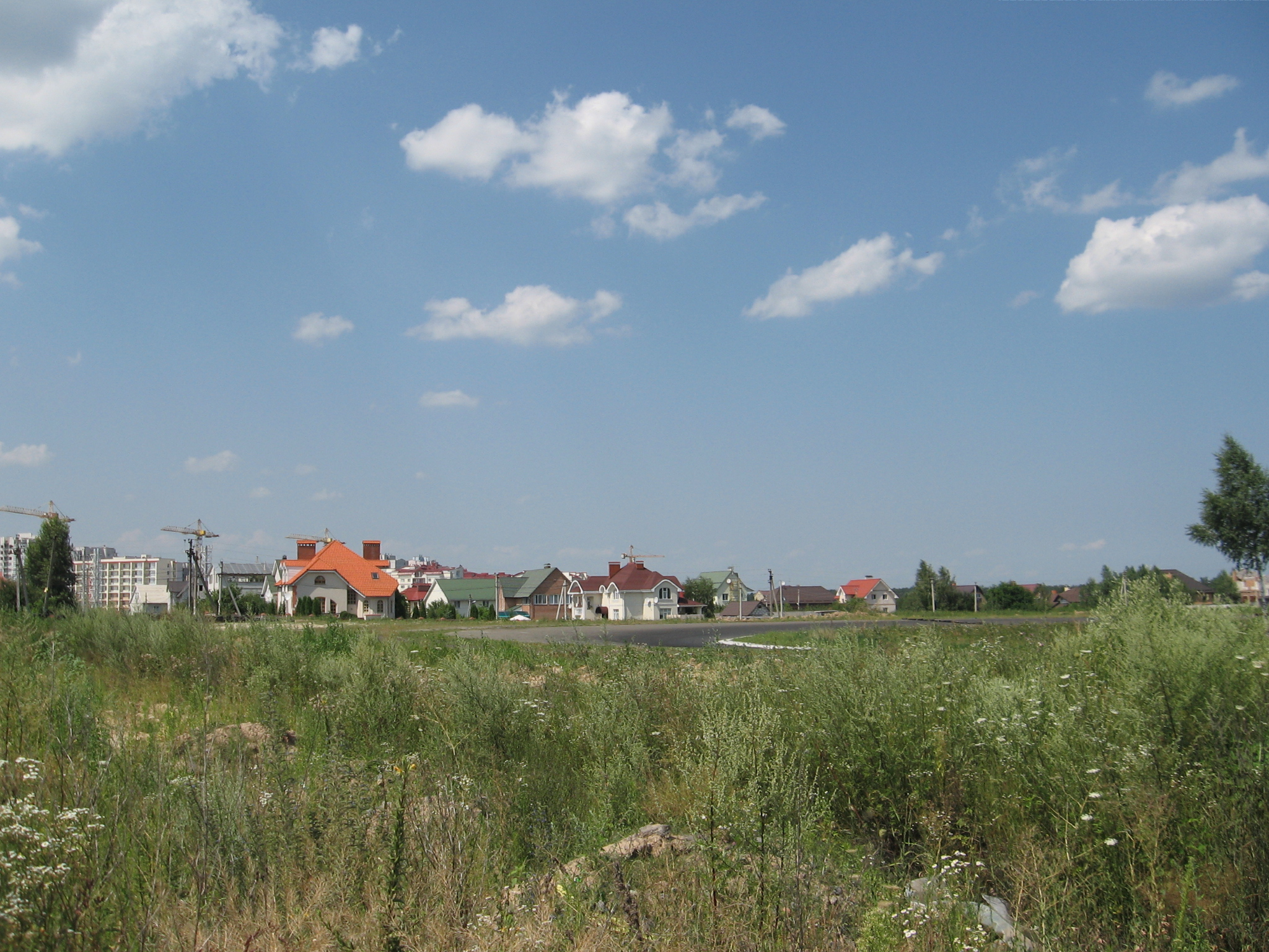 Село Чайки (Киевская обл.)